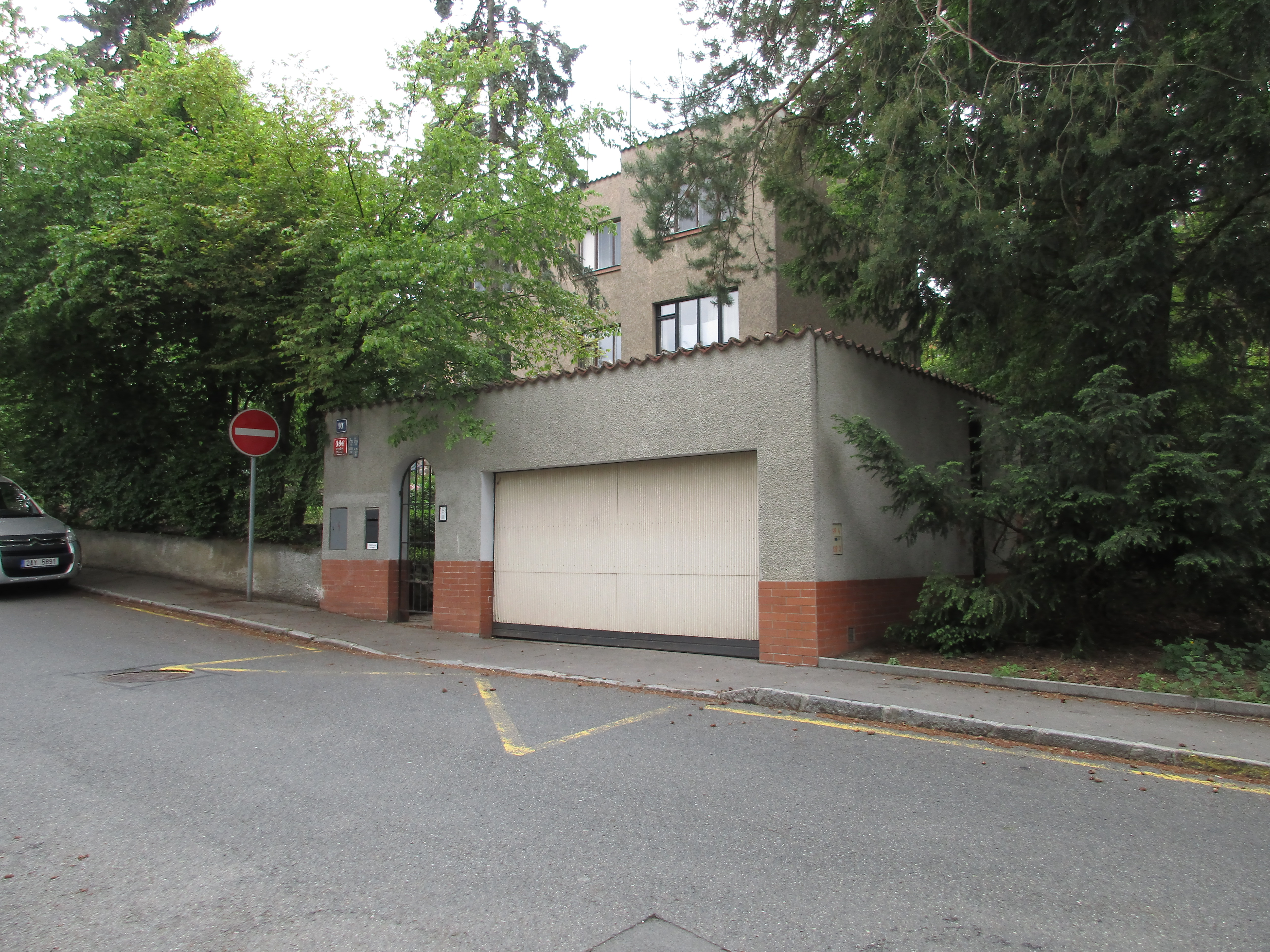 Filmařská 384/10, Praha 5-Hlubočepy